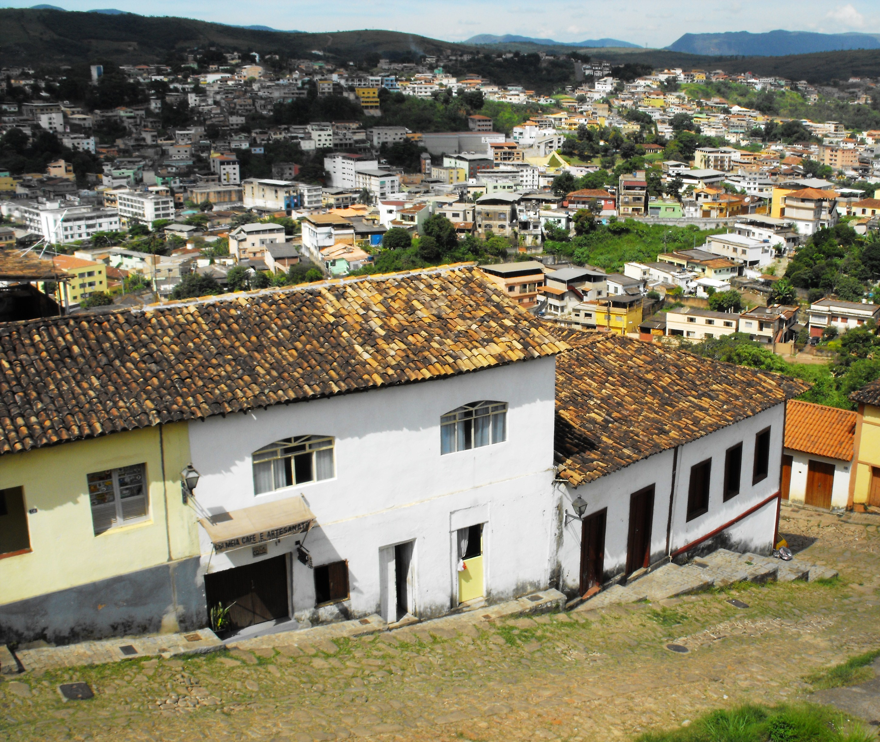 Congonhas, MG